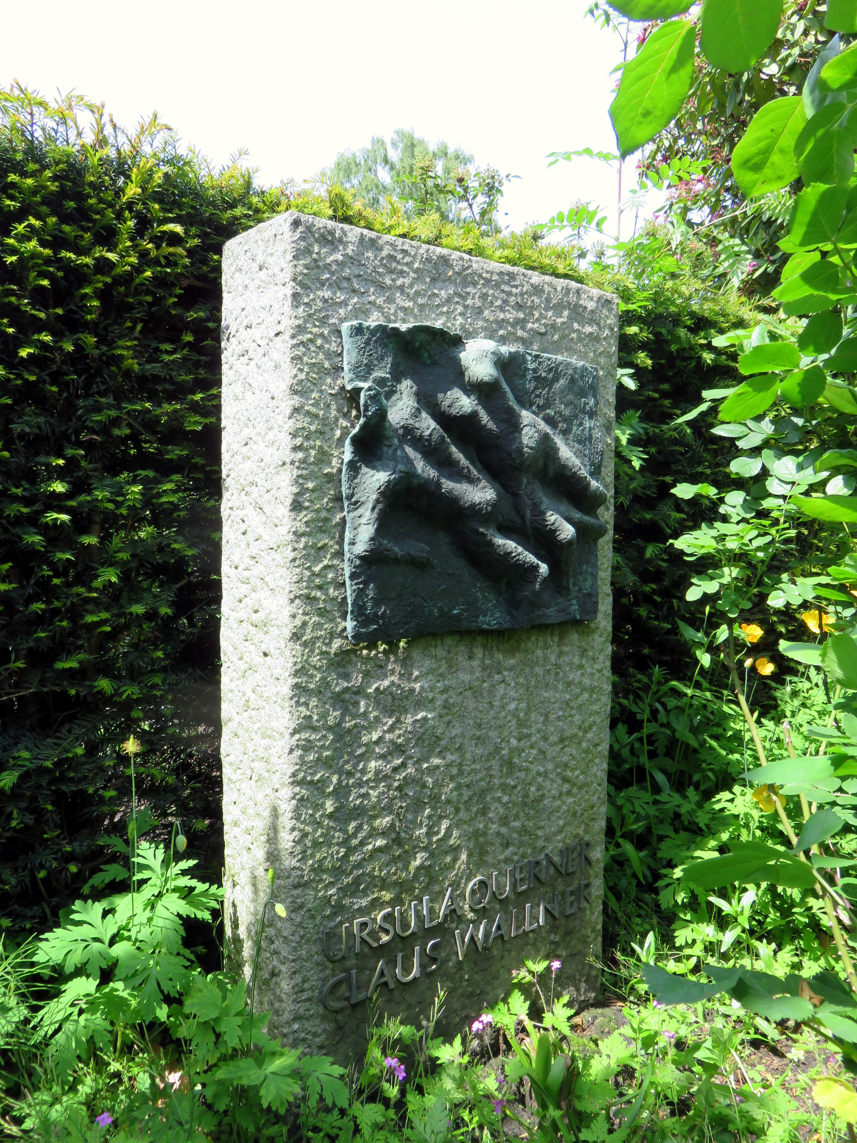 Grab der deutschen Bildhauerin Ursula Querner und des deutschen Malers und Kirchenfensterkünstlers Claus Wallner, Friedhof Bernadottestraße, Hamburg-Ottensen, mit Bronzerelief (“Liebespaar”).